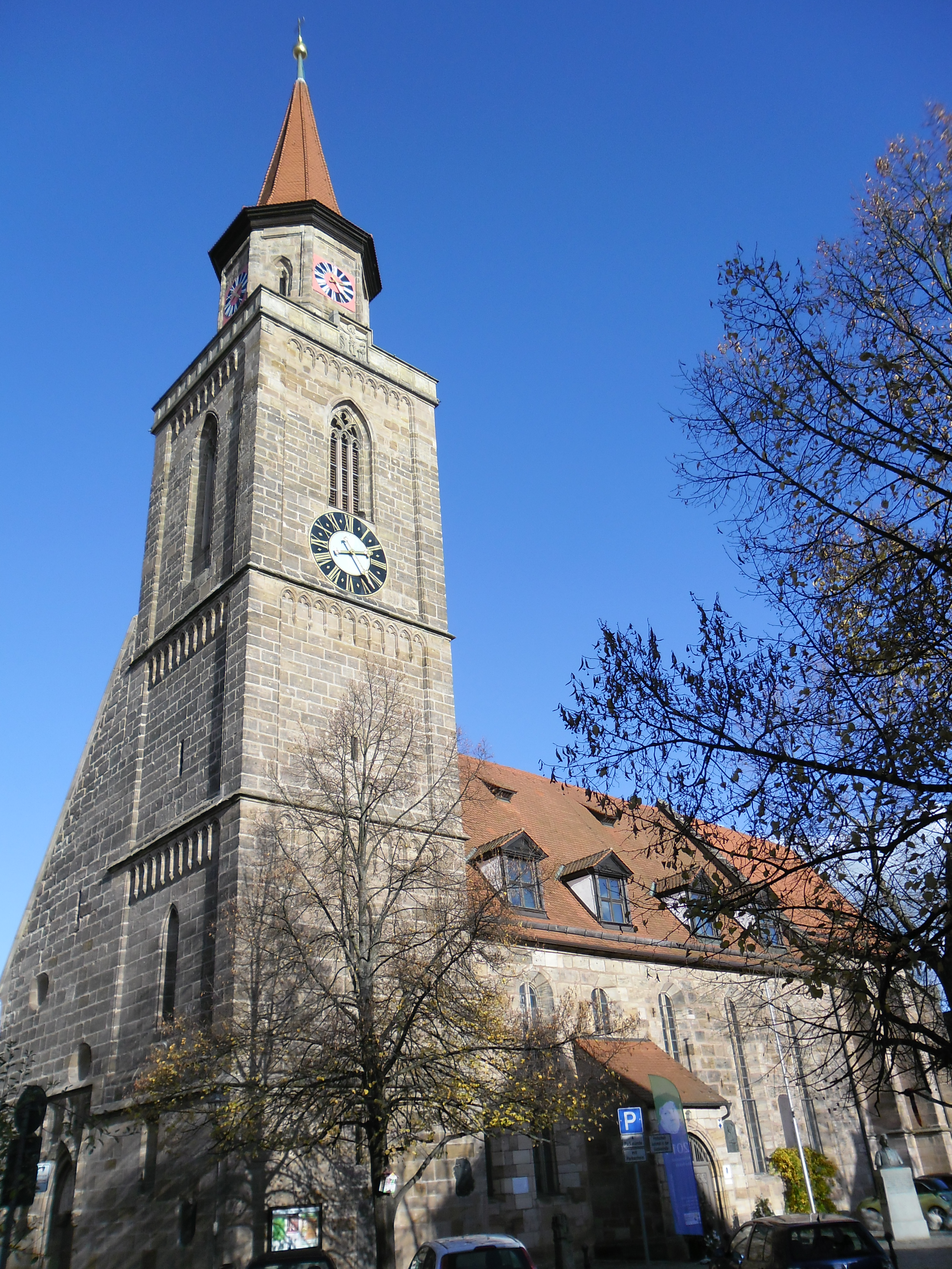 Michaelskirche Fürth November 2014 08